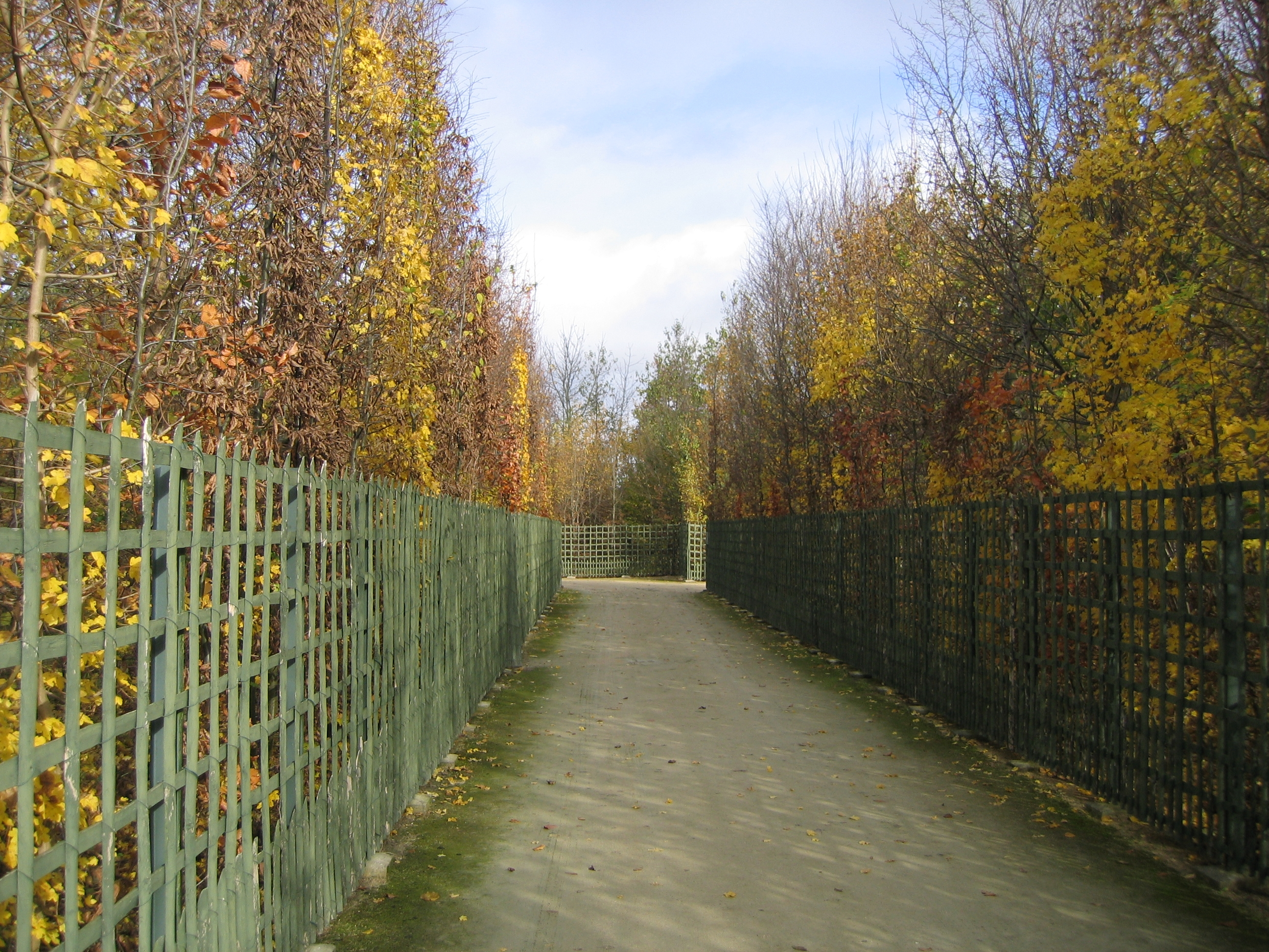 Allée dans les bosquets du parc du château de Versailles